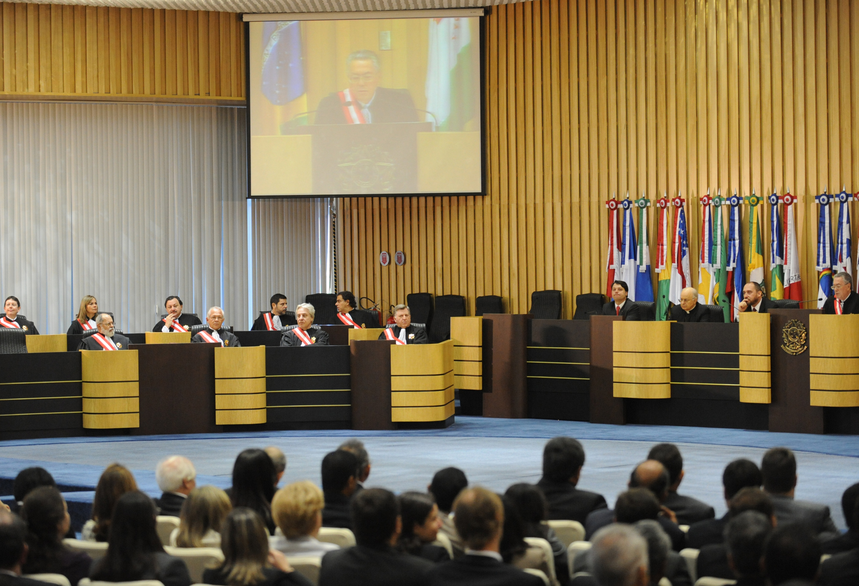 Brasília - O novo ministro do Tribunal Superior do Trabalho (TST), José Roberto Freire Pimenta, durante a cerimônia de posse (Wilson Dias/ABr)